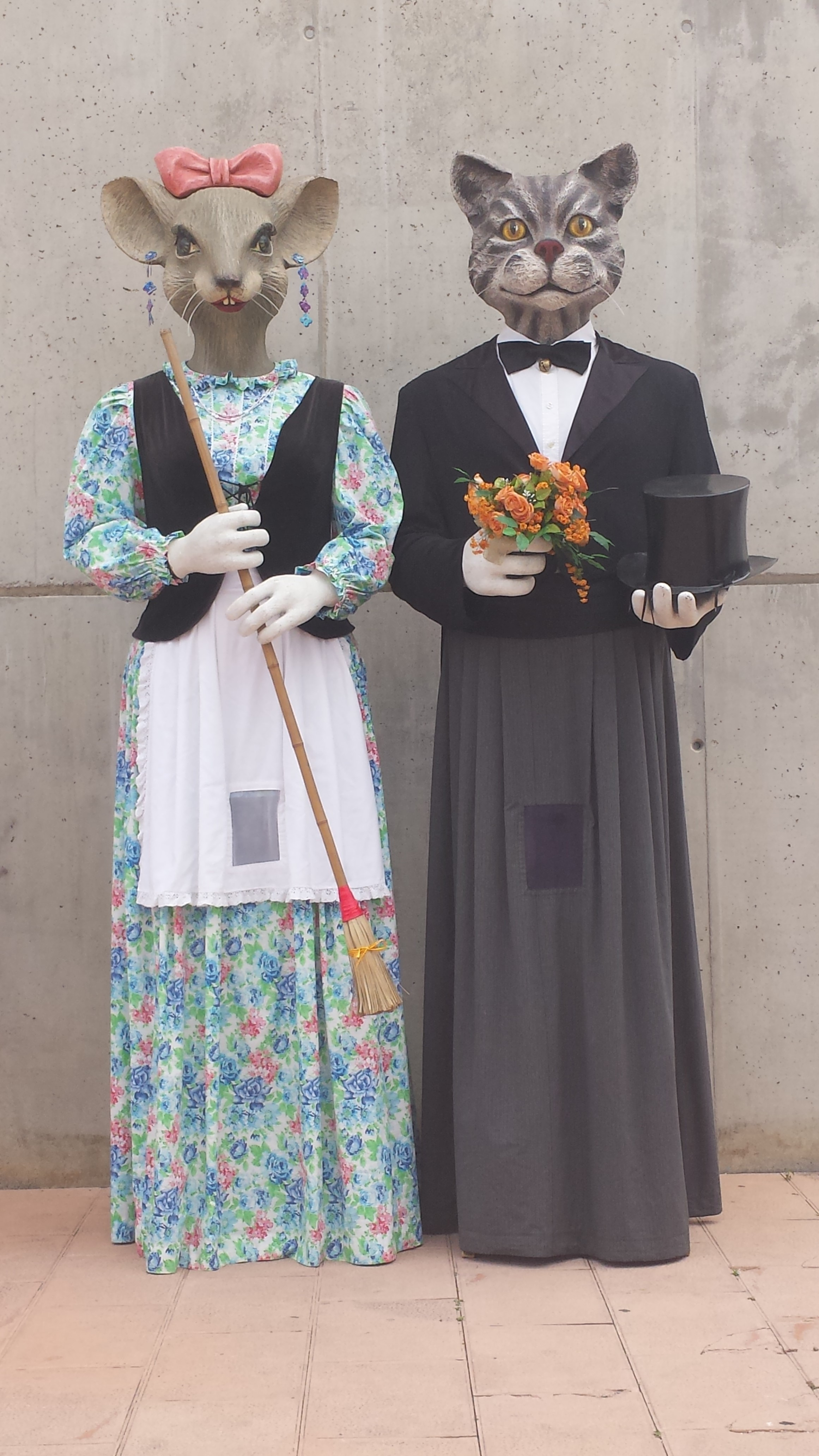 En Martí i la Valentina (Fotografia: Gegants Catalans)